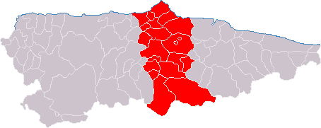 Concejos del Área metropolitana central de Asturias